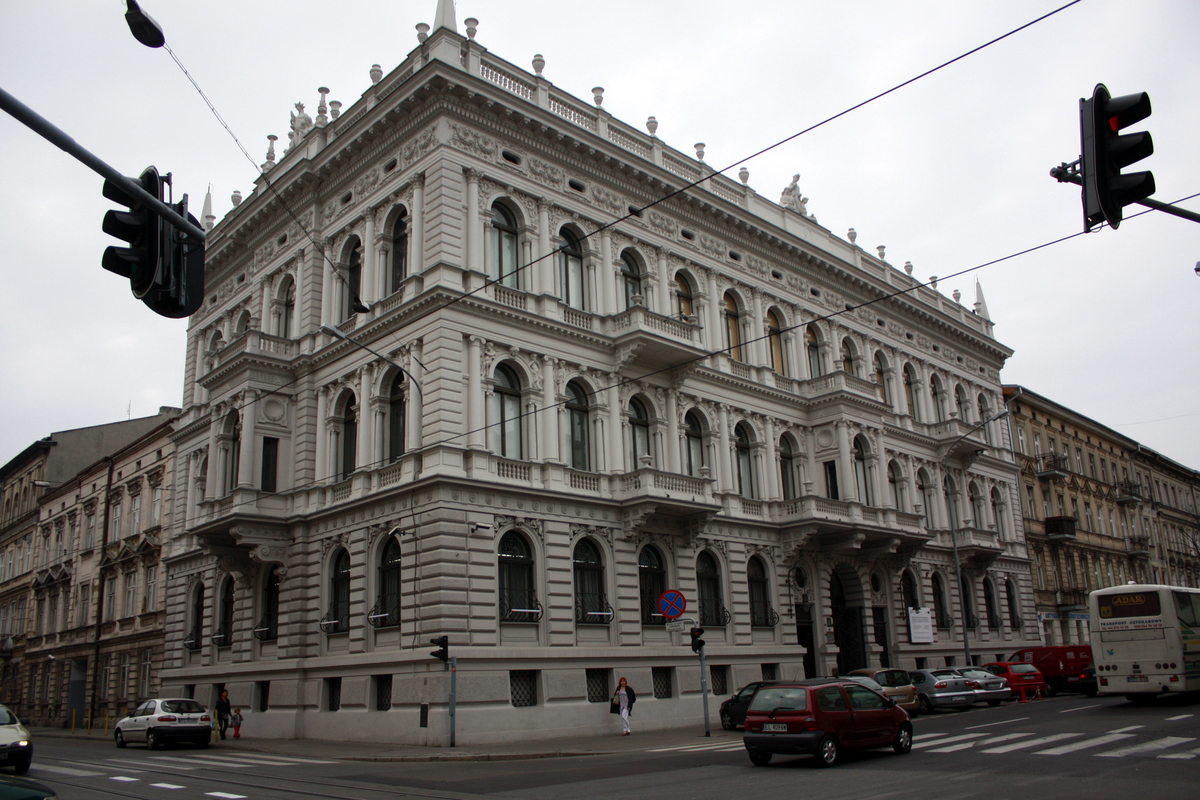 Łódź - Pałac Poznańskich, ob. Muzeum Sztuki